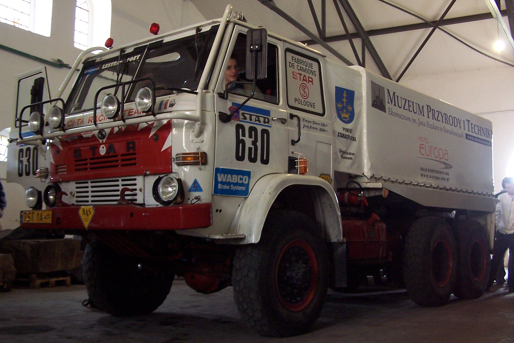 Jedyny zachowany egzemplarz Stara 266 startującego w rajdzie Paryż-Dakar. Znajduje się on w Muzeum Przyrody i Techniki w Starachowicach.